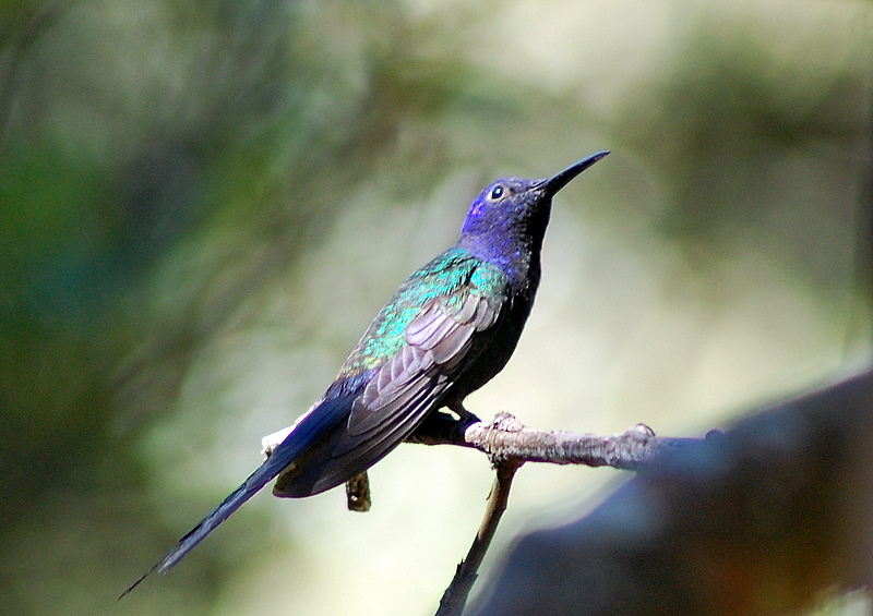 Eupetomena macroura, Jardim Botânico de São Paulo